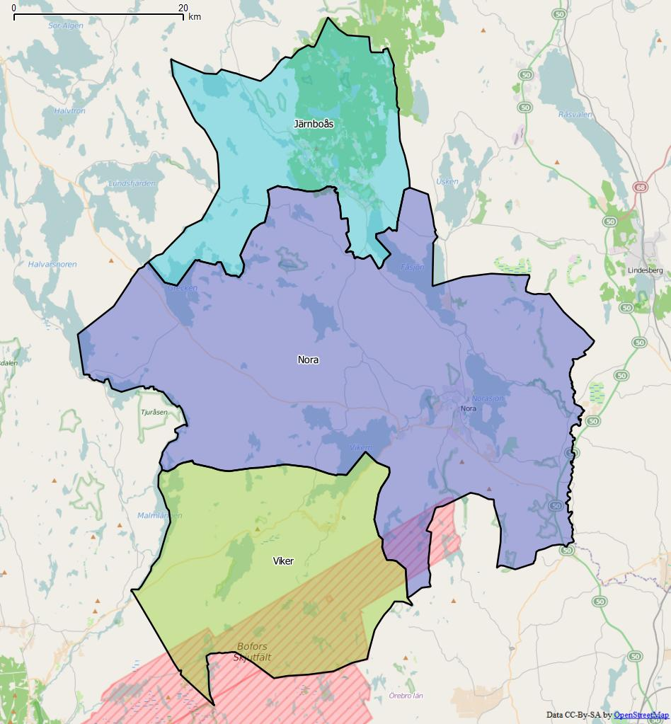 Distriktsindelningen i Nora kommun World file: 83.64935502590554961 0 0 -83.64935502590554961 1618800.66093346825800836 8341522.57324016373604536